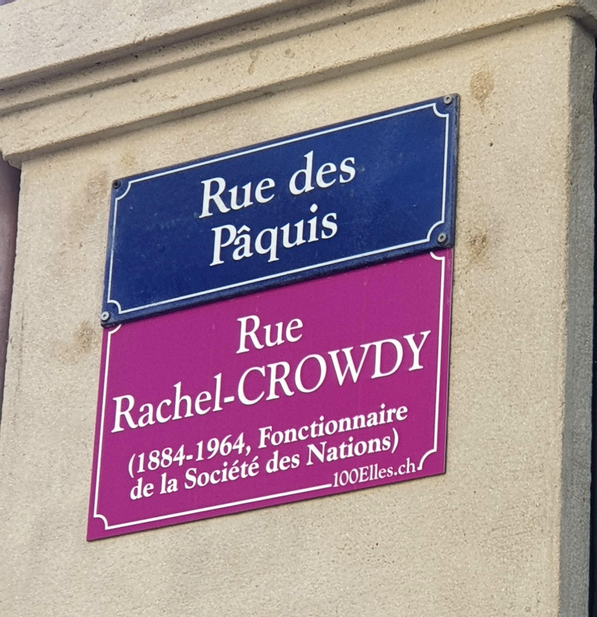 Plaque temporaire de rue apposée dans le cadre du projet 100elles à Genève en 2019